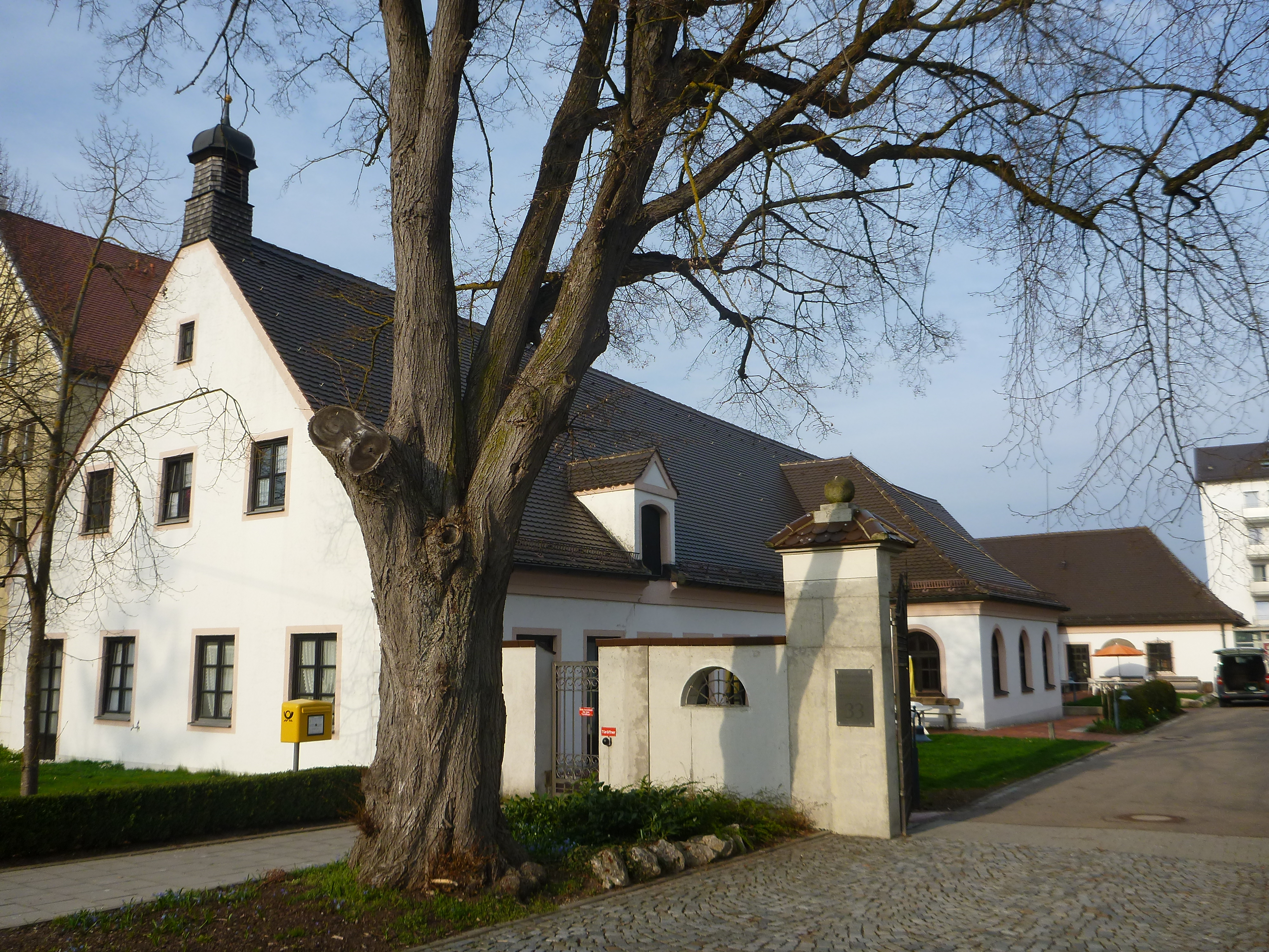 ehem. Ökonomiegebäude des Meitinger Schlosses, eingeschossiger Trakt in zwei Flügeln, um 1770, im Nordtrakt Hauskapelle, um 1910